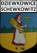 Herb wsi Dziewkowice